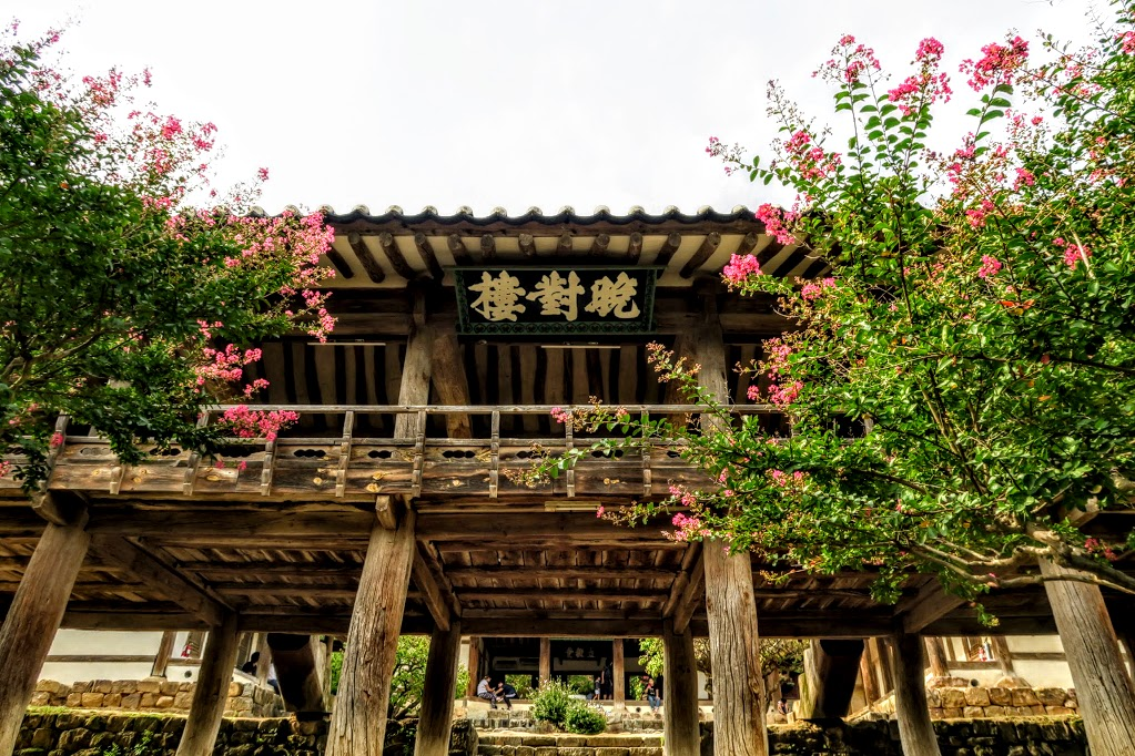 병산서원 만대루